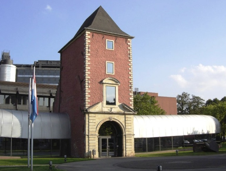 Den Entréestuerm vum Wirtschaftsgebai vum Berwarter Schlass, gebaut 1721, deen haut d'Entree vun engem Bürogebäi ass.